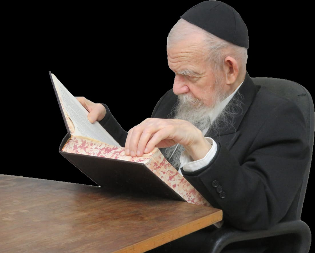 רבי גרשון אדלשטיין לומד